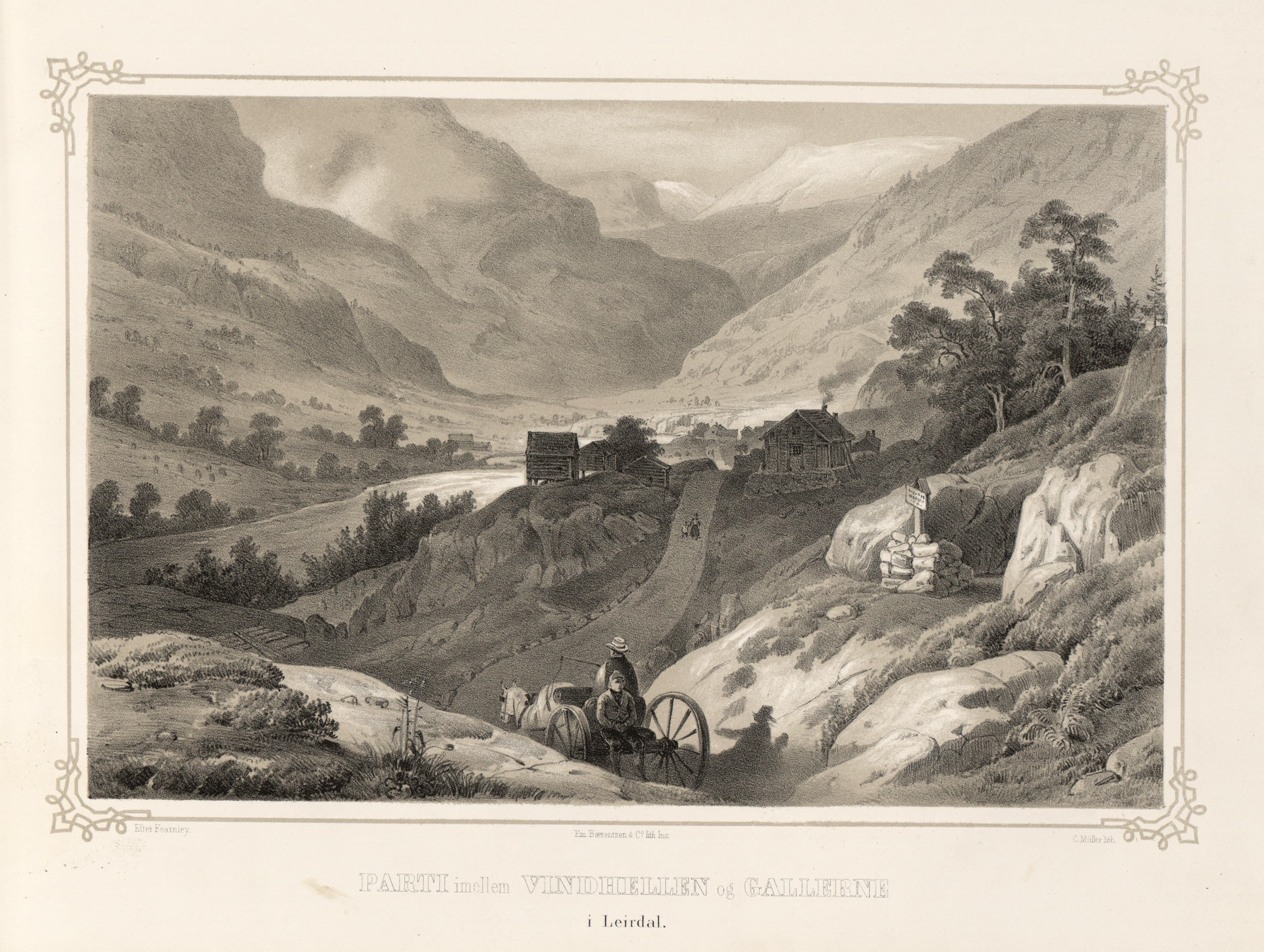 "Parti imellem Vindhellen og Gallerne i Leirdal." Illustrasjon hentet fra boken "Norge fremstillet i Tegninger" av Asbjørnsen, P.Chr. og utgitt av Chr. Tønsberg (no, 1848)